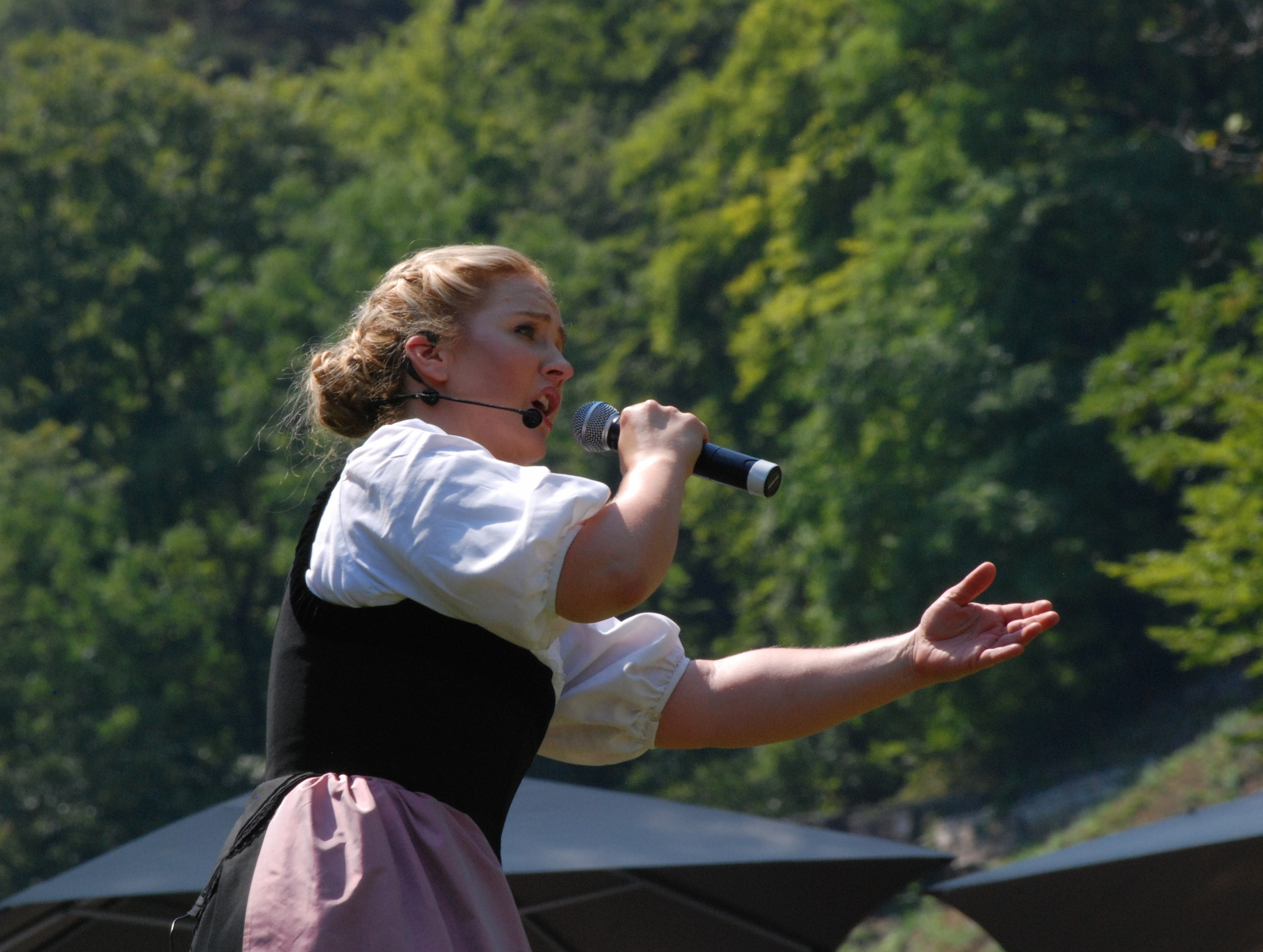 Barbara Klossner am 1. August 2018 auf dem Rütli beim Singen des Liedes Gilberte de Courgenay